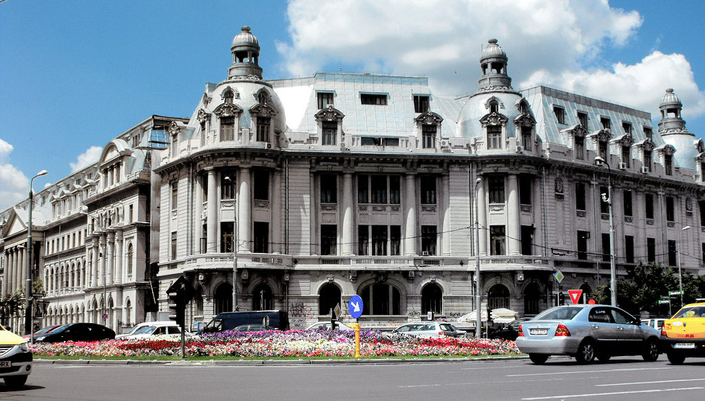 Universitatea din Bucuresti